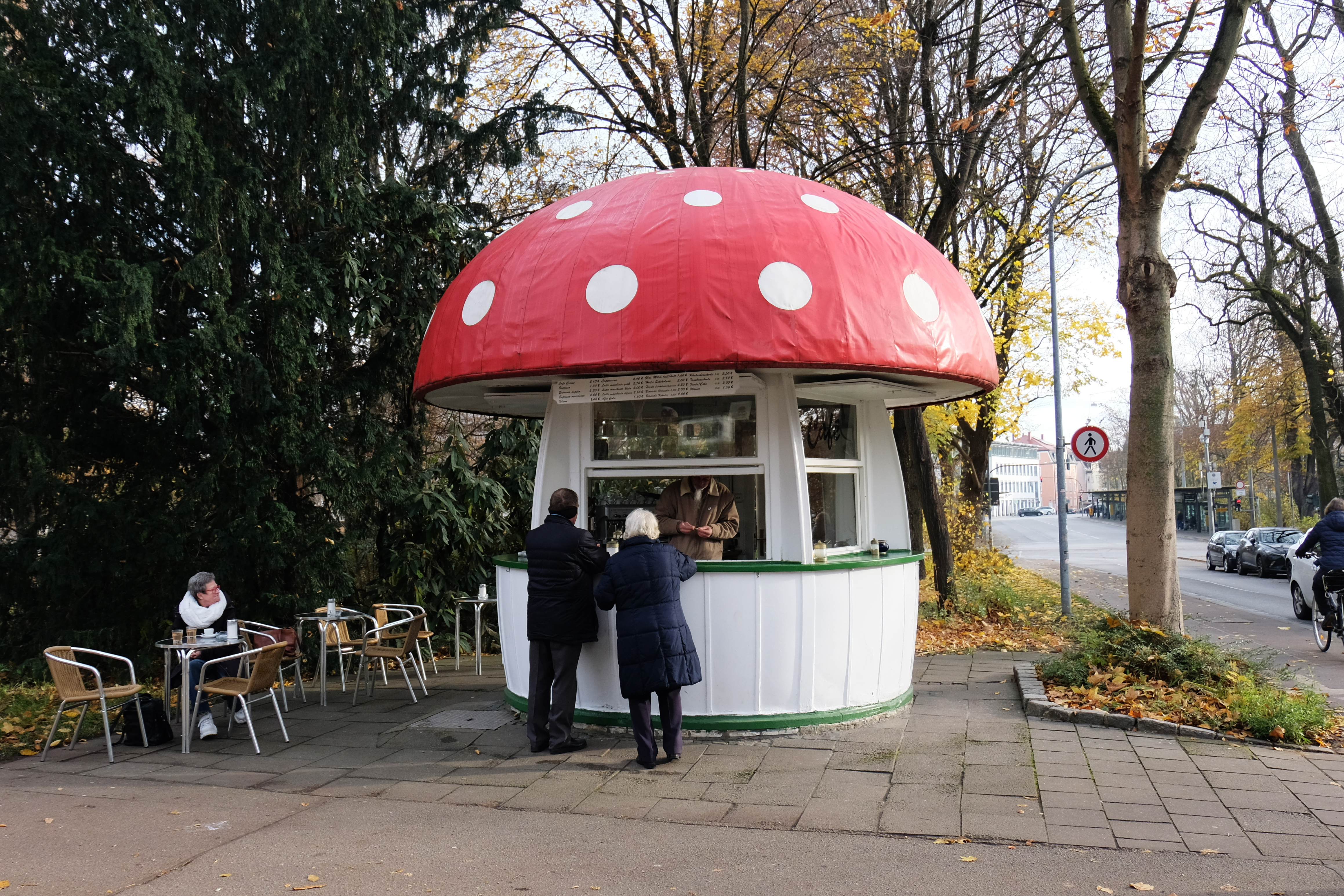 Kiosk in Form eines Fliegenpilzes in Regensburg, Nähe Hauptbahnhof (2019)